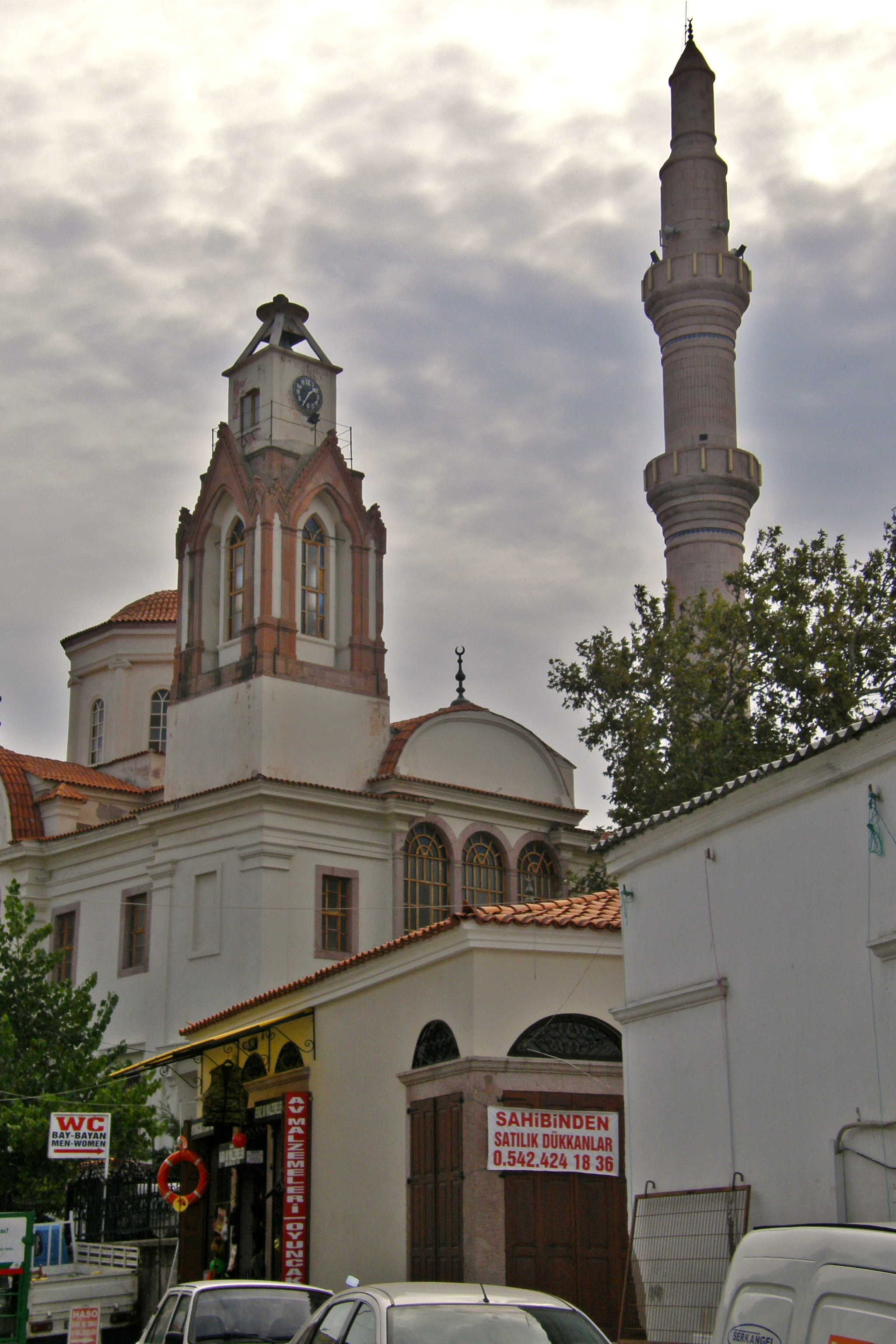 Mosquée Saatli à Ayvalık, province de Balıkesir, région de Marmara, Turquie.